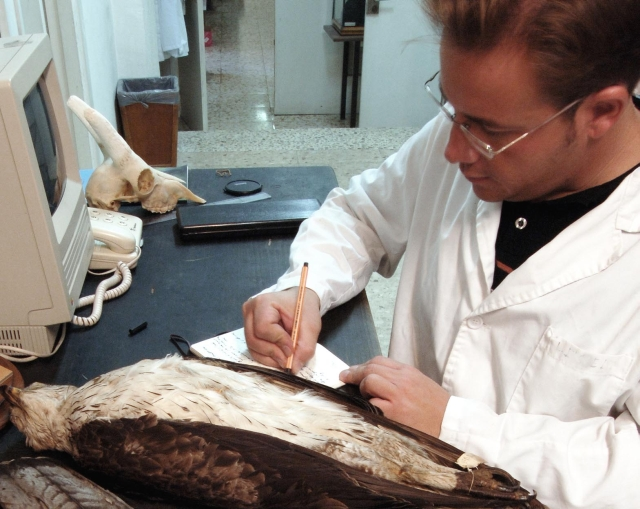 Víctor J. Hernández en 2006, en el Museo Nacional de Ciencias Naturales, Madrid